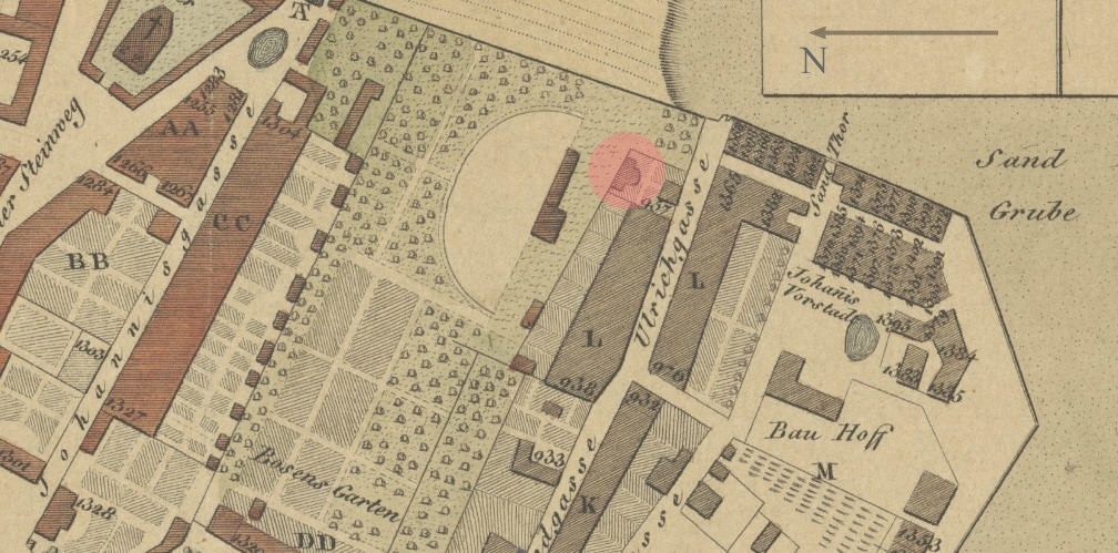 Das Lincksche Gartenhaus (Kreis) auf einem Ausschnit eines Leipziger Stadtplans von 1830